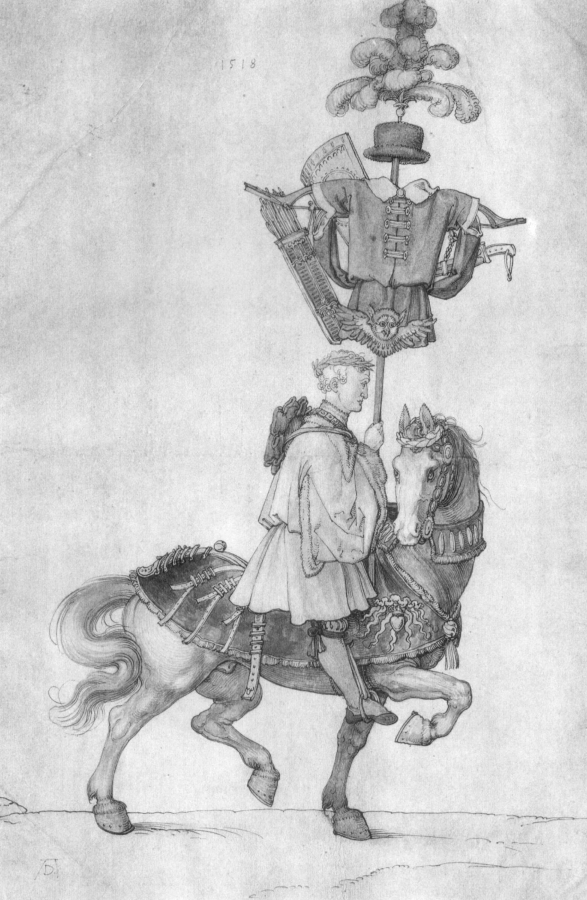 Detailentwurf für die Holzschnittfolge kaiserlichen Triumpfzuges Maximilian I., 1526 erstmals vollständig gedruckt, Dürer war für die Gestaltung Wagens mit der Vermähling Kaiser Maximilians mit der Maria von Burgund zuständig und veröffentlichte diesen bereits 1522 in acht Blättern